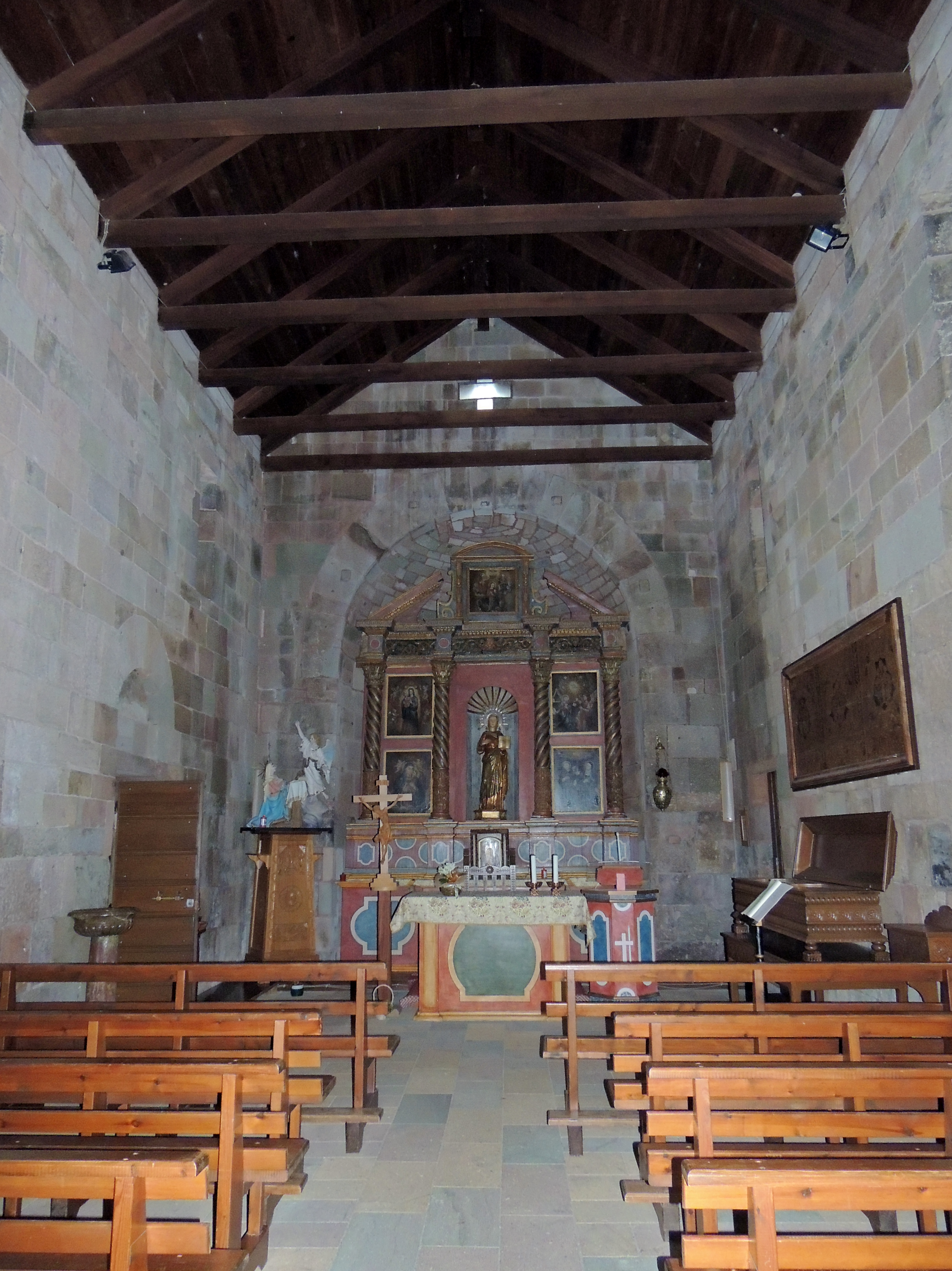 OSCHIRI - NOSTRA SIGNORA DI CASTRO